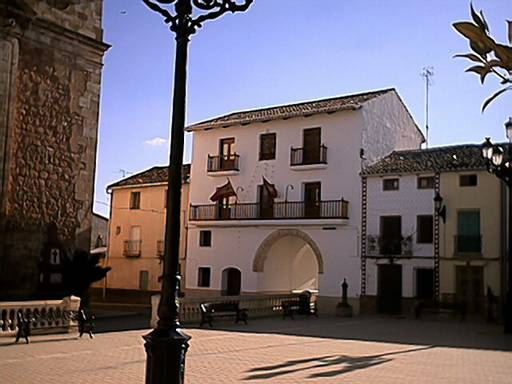 Ayuntamiento de Villagarcia del Llano